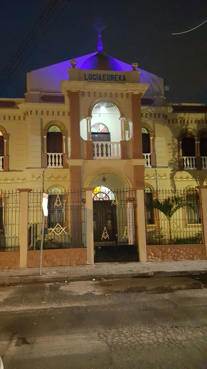 Templo masónico Eureka en San Pedro Sula Honduras, donde se reune la Muy respetable Logia Masónica Miguel Paz Baraona #2